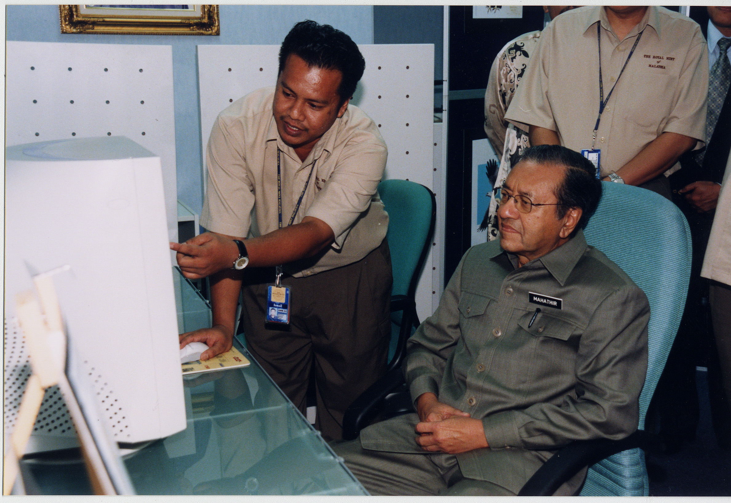 Ismail memberi penerangan kepada Tun Dr. Mahathir Mohamad mengenai rekaan duit syilingnya semasa Perdana Menteri Malaysia itu melawat Royal Mint of Malaysia pada tahun 2002.